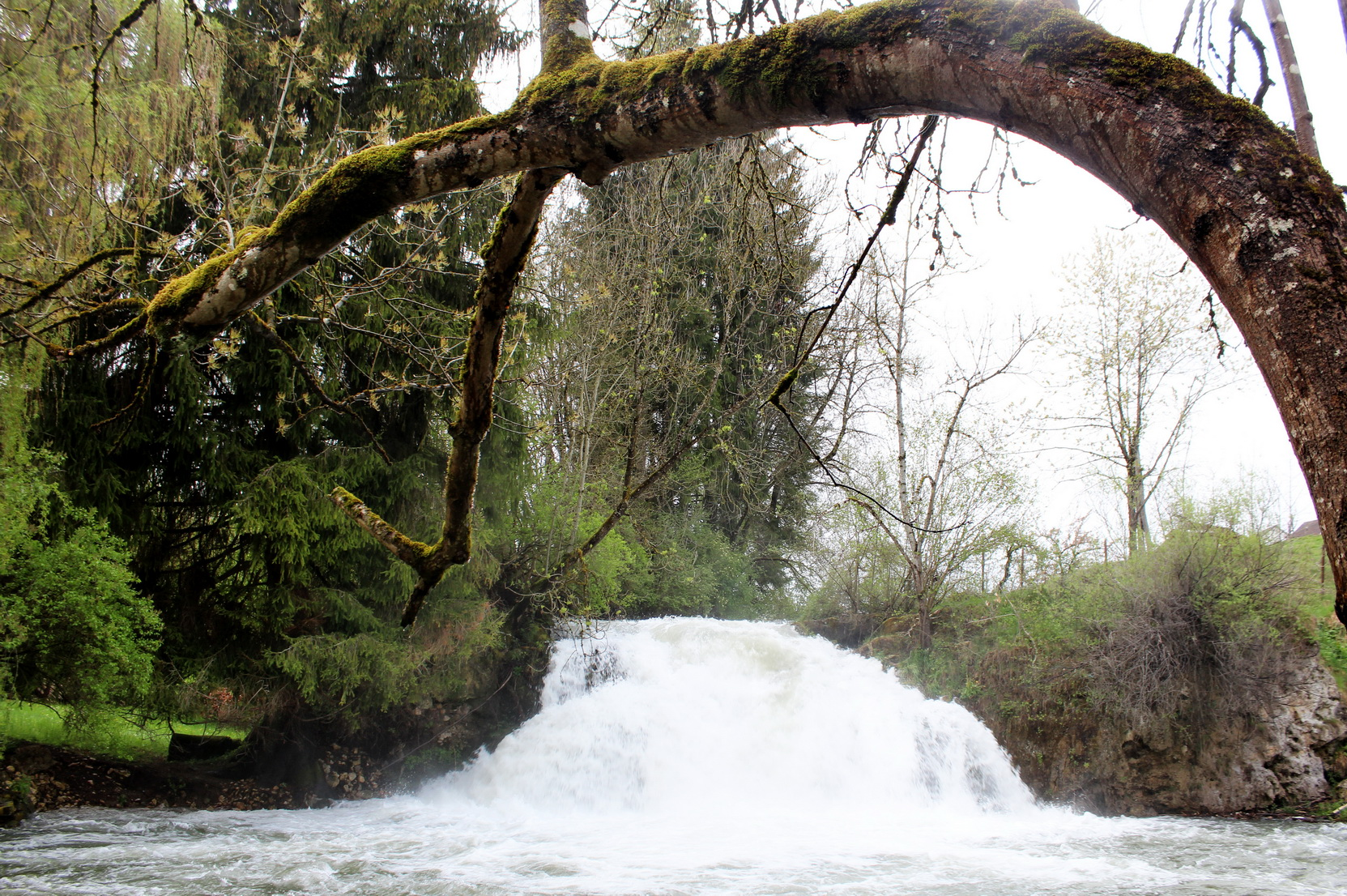 Der Wasserfall „Gieß“ (Naturdenkmal) in Veringendorf war, nach der Wassermenge und der Höhe der Kalktuffbarre, der größte Wasserfall der Schwäbischen Alb. Der Wasserfall wurde durch den Bau eines E-Werks in den 1920er Jahren erheblich beeinflusst. Das Bild zeigt den Wasserfall bei geöffnetem Wehr während eines Hochwassers am 3. Mai 2015.